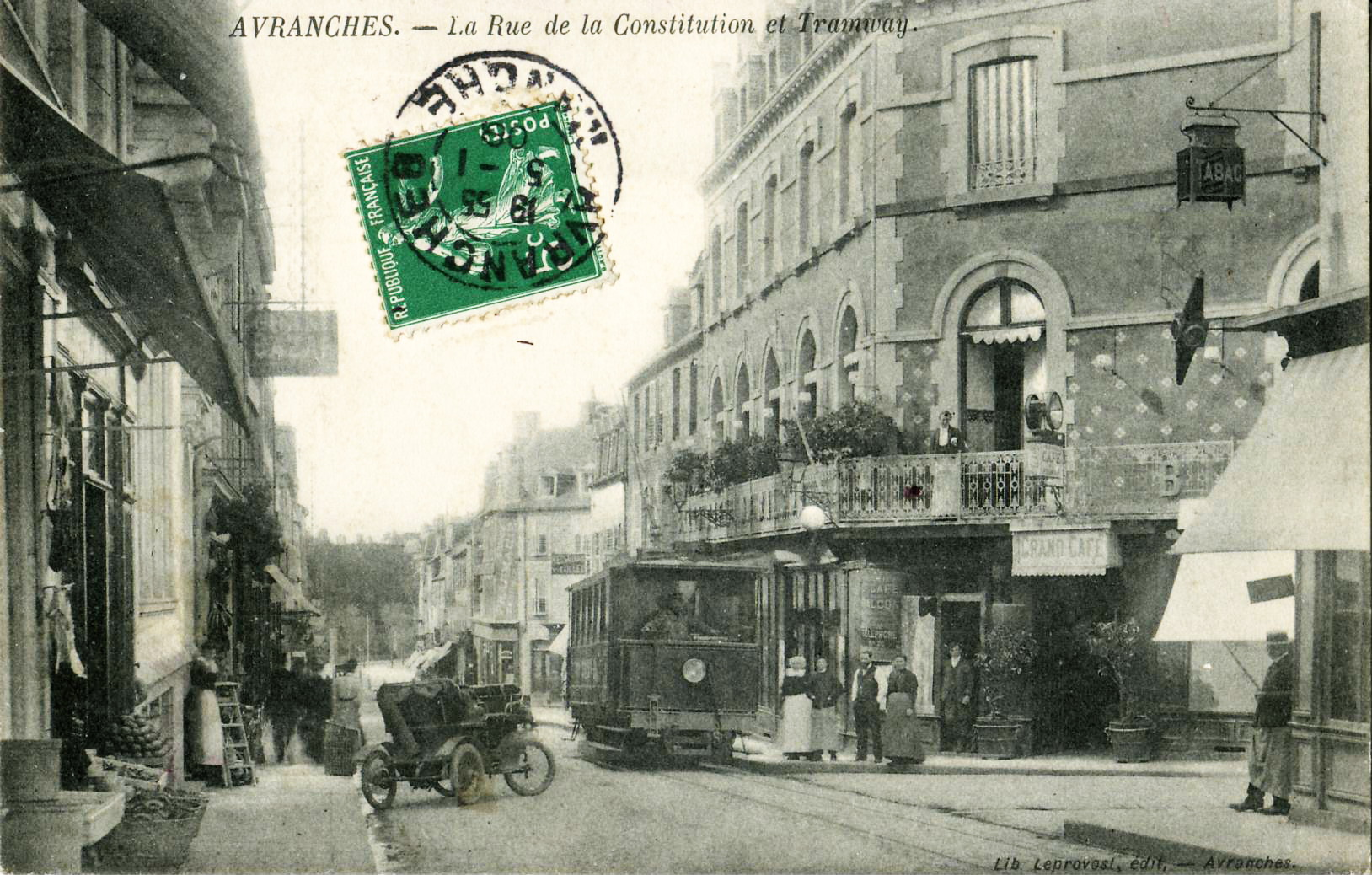 Carte postale ancienne éditée par Leprovost à Avranches, n°3205 : AVRANCHES - La rue de la Constitution et Tramway